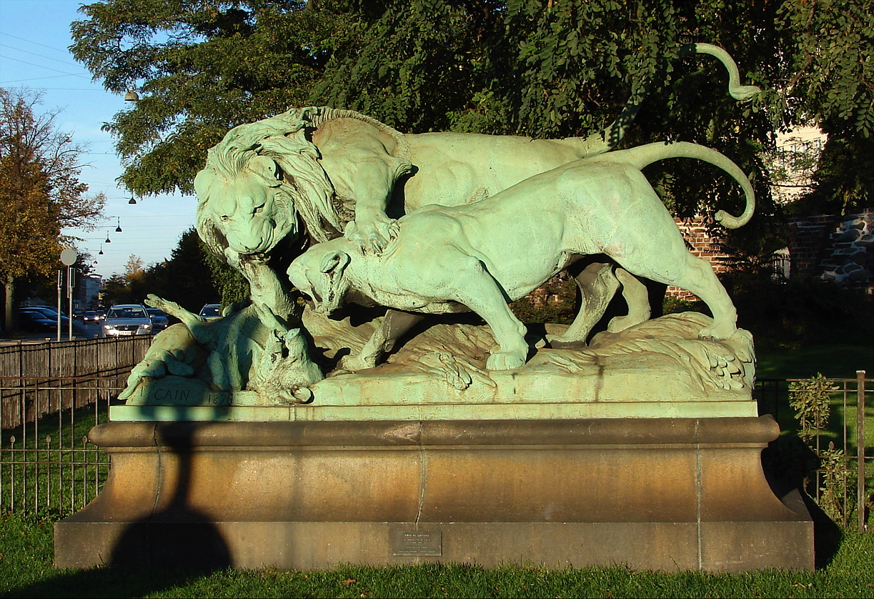 Løve og løvinde, bronze, Auguste-Nicolas Cain (1822-1894), 1874, opstillet 1889, København